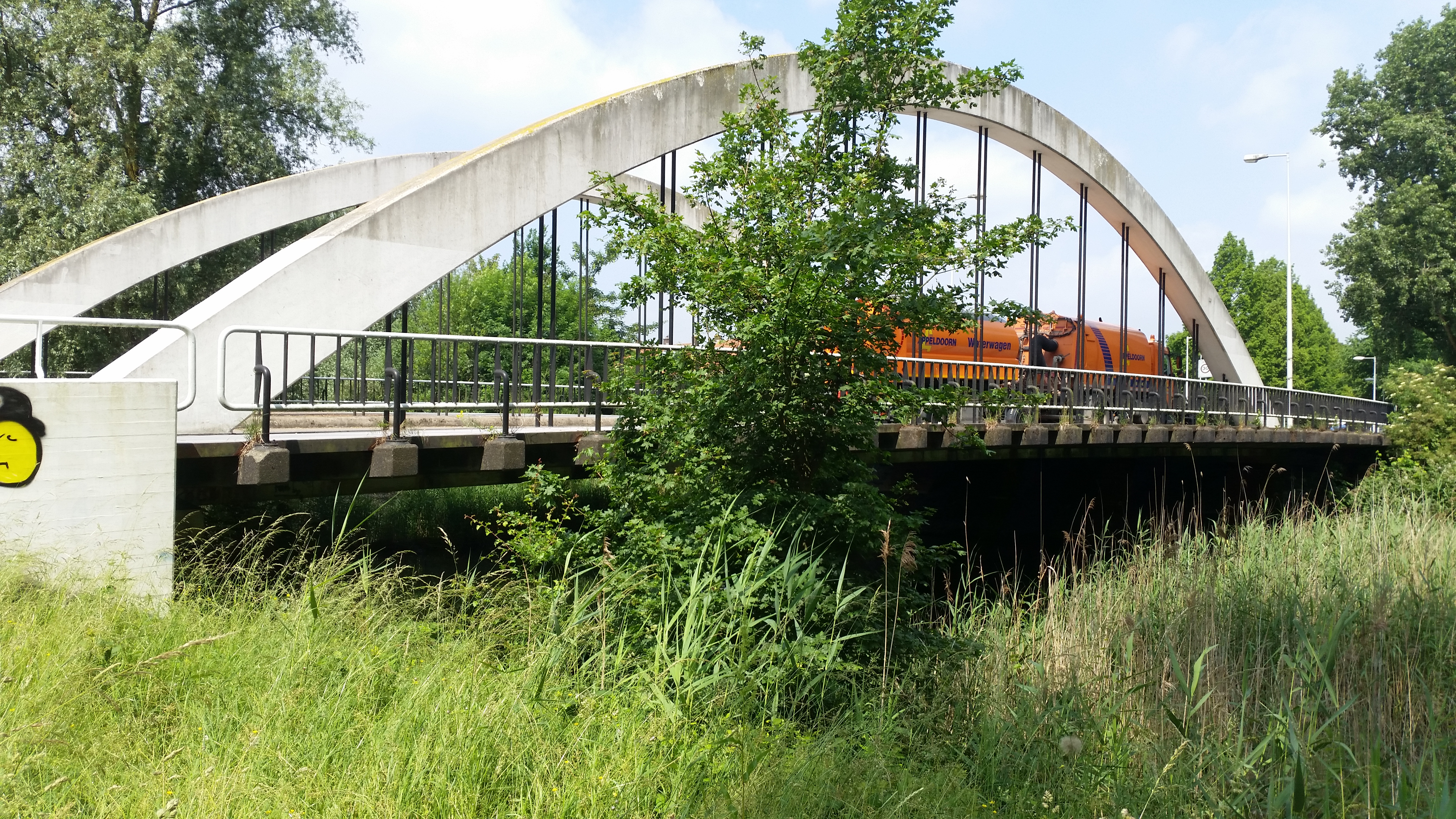 Brug 469, Witte Boogbrug, overspanning tussen rietlanden